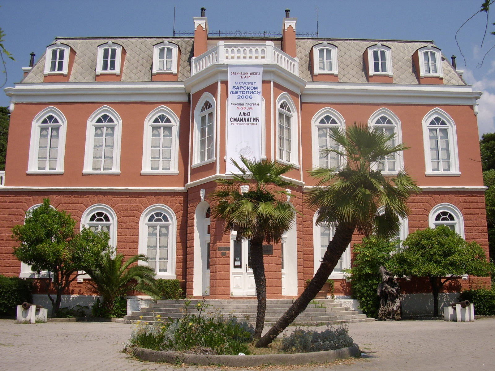 Дворац краља Николе у Бару